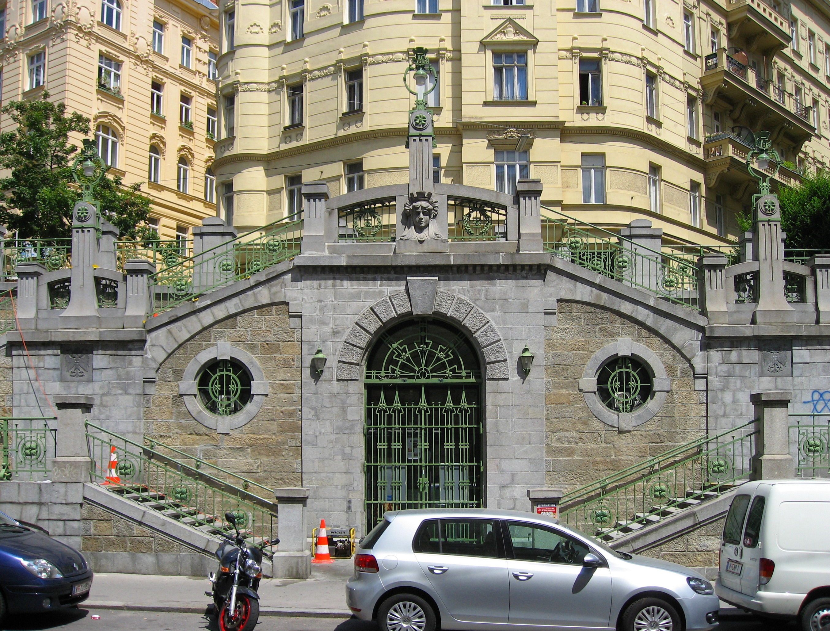 Wien, Fillgraderstiege